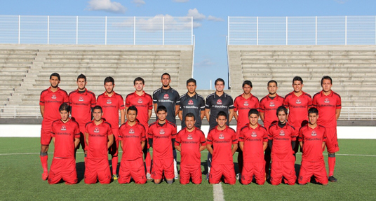 Jugadores (uniforme Visitantes) Del Futbol Club Deportivo Yahualica de los Altos Foto tomada en estadio Las animas, Yahualica JAL. MEX. Unknown